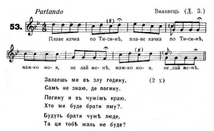 Текст і ноти "Пливе кача по Тисині"